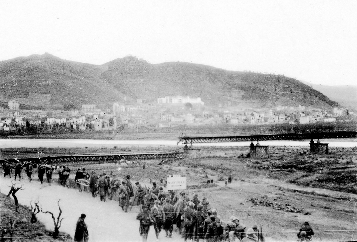 C/34. Martorell (Barcelona). Puente del ferrocarril sobre el rio Llobregat volado por el bando republicano. Al fondo Martorell.